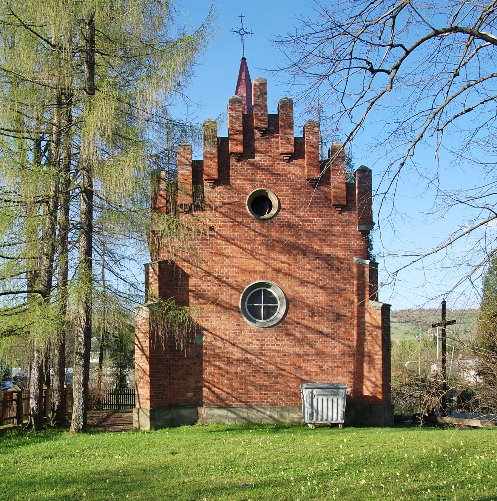 wieś Ustjanowa Górna